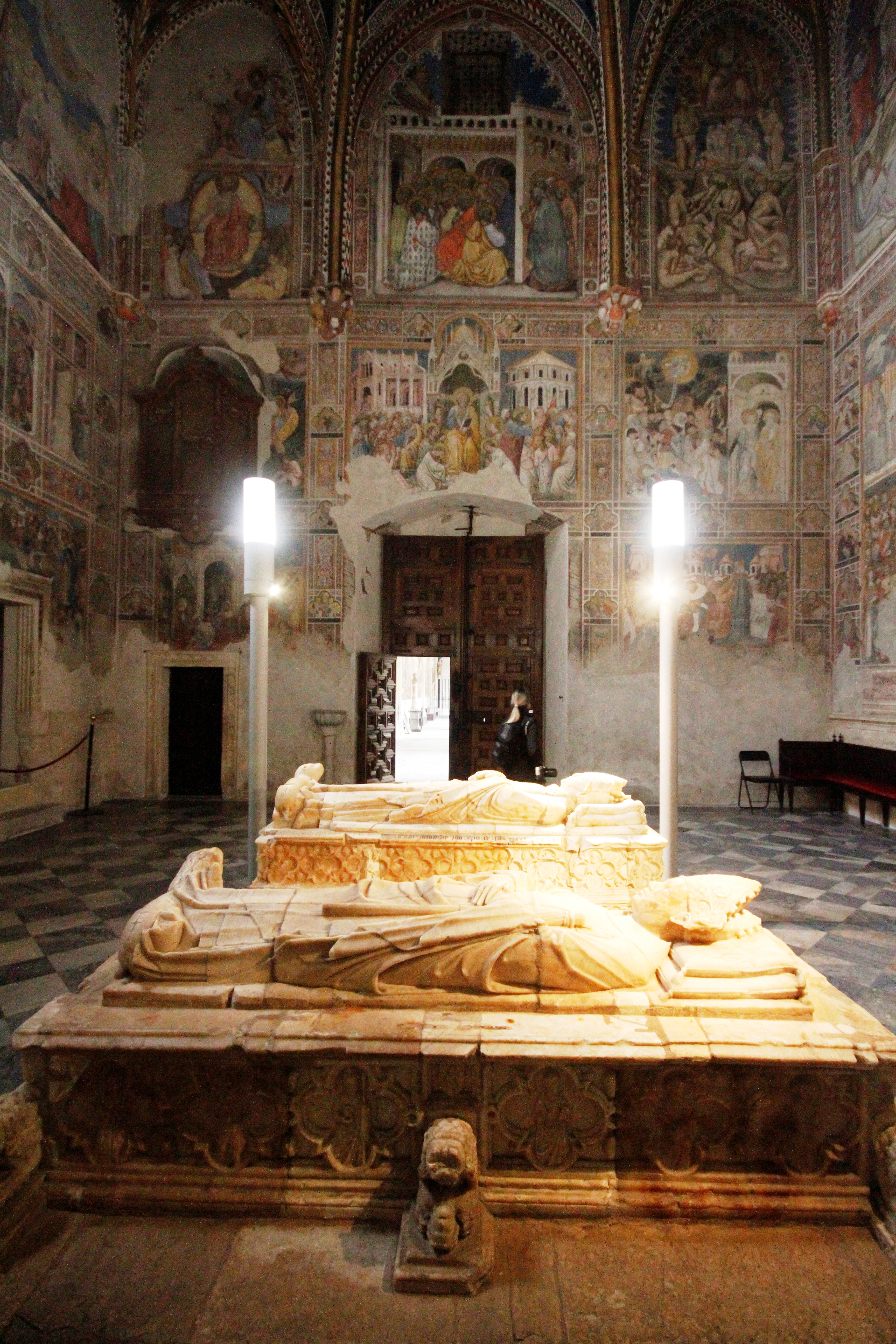 Capela de São Brás